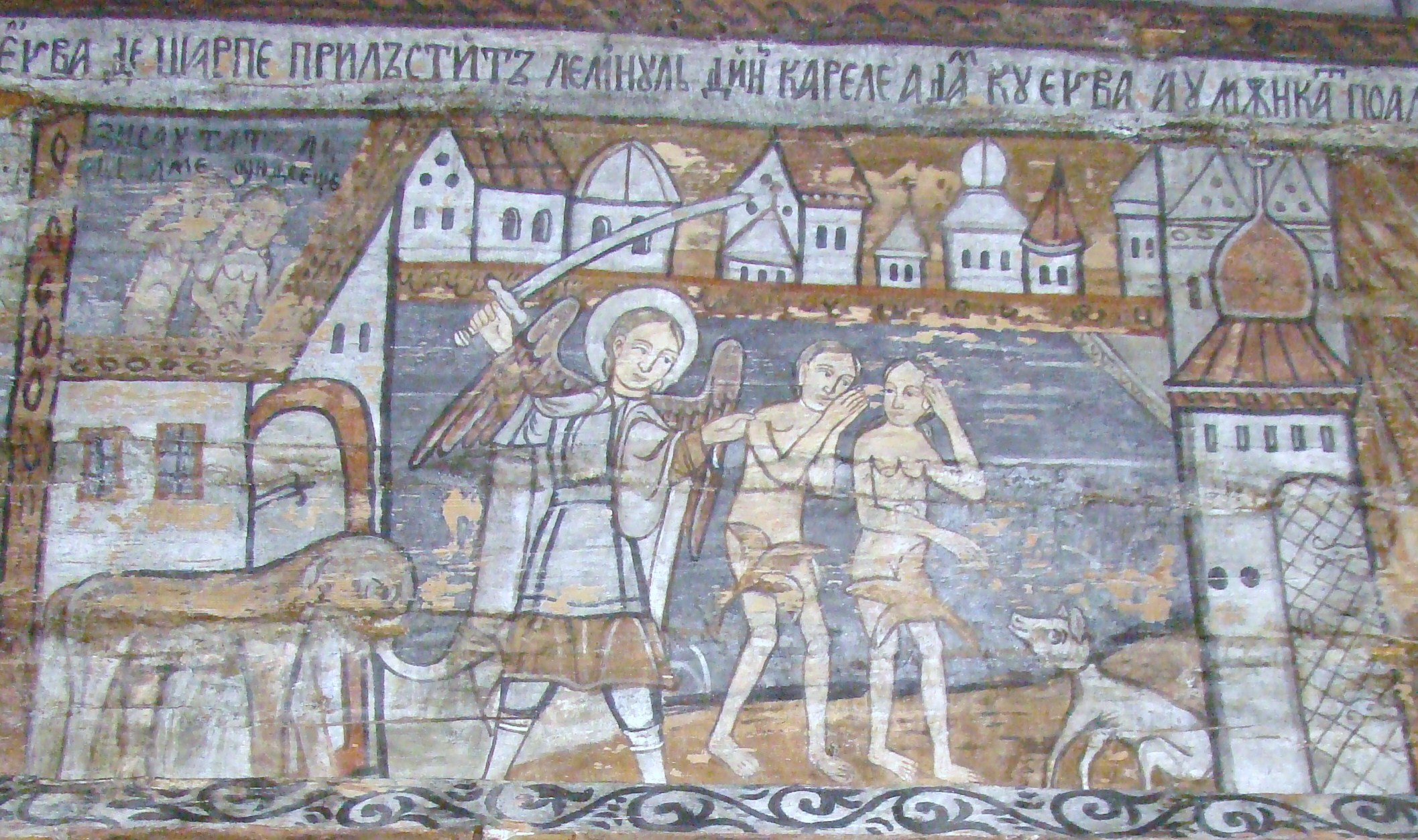 Biserica de lemn "Naşterea Maicii Domnului", sat IEUD